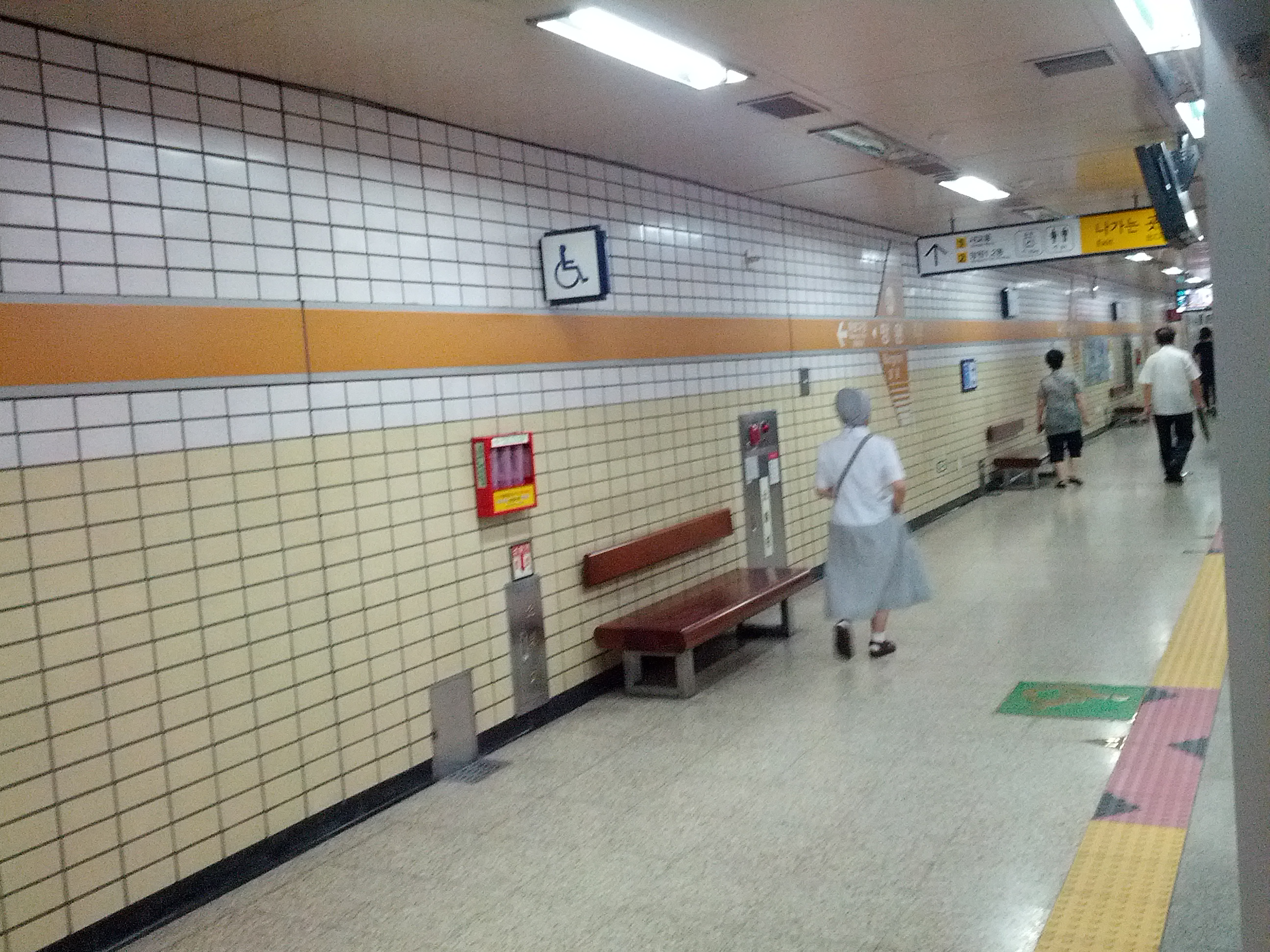 망원역 승강장